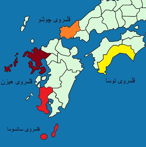 Map of Satsuman, Chōshū, Hizen, and tosa Domain